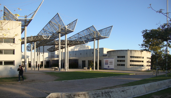 Vista del Claustrum de la Universidad Nacional de Córdoba. Arquitecto: Miguel Ángel Roca